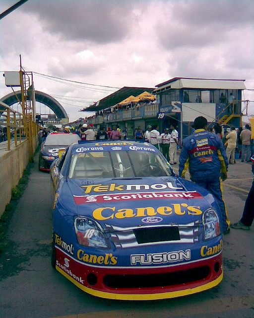 Imagen de Rafael Martínez en el Autódromo Monterrey. En la temporada 2007 de Nascar